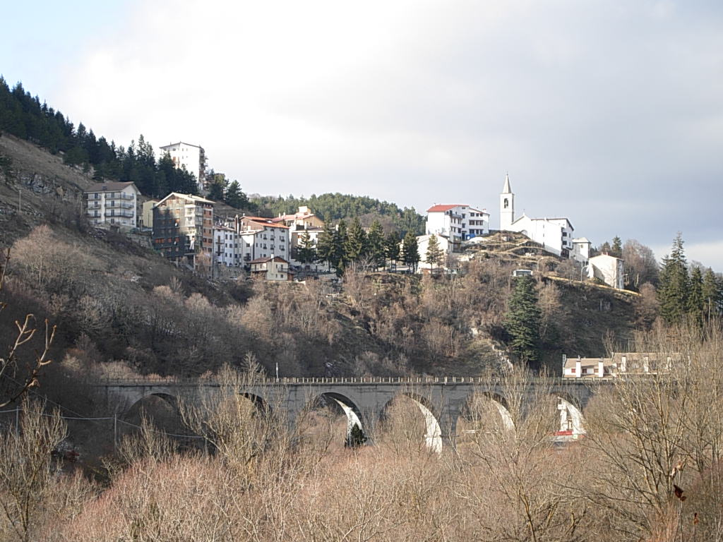 Roccaraso (AQ) Foto personale concessa in PD